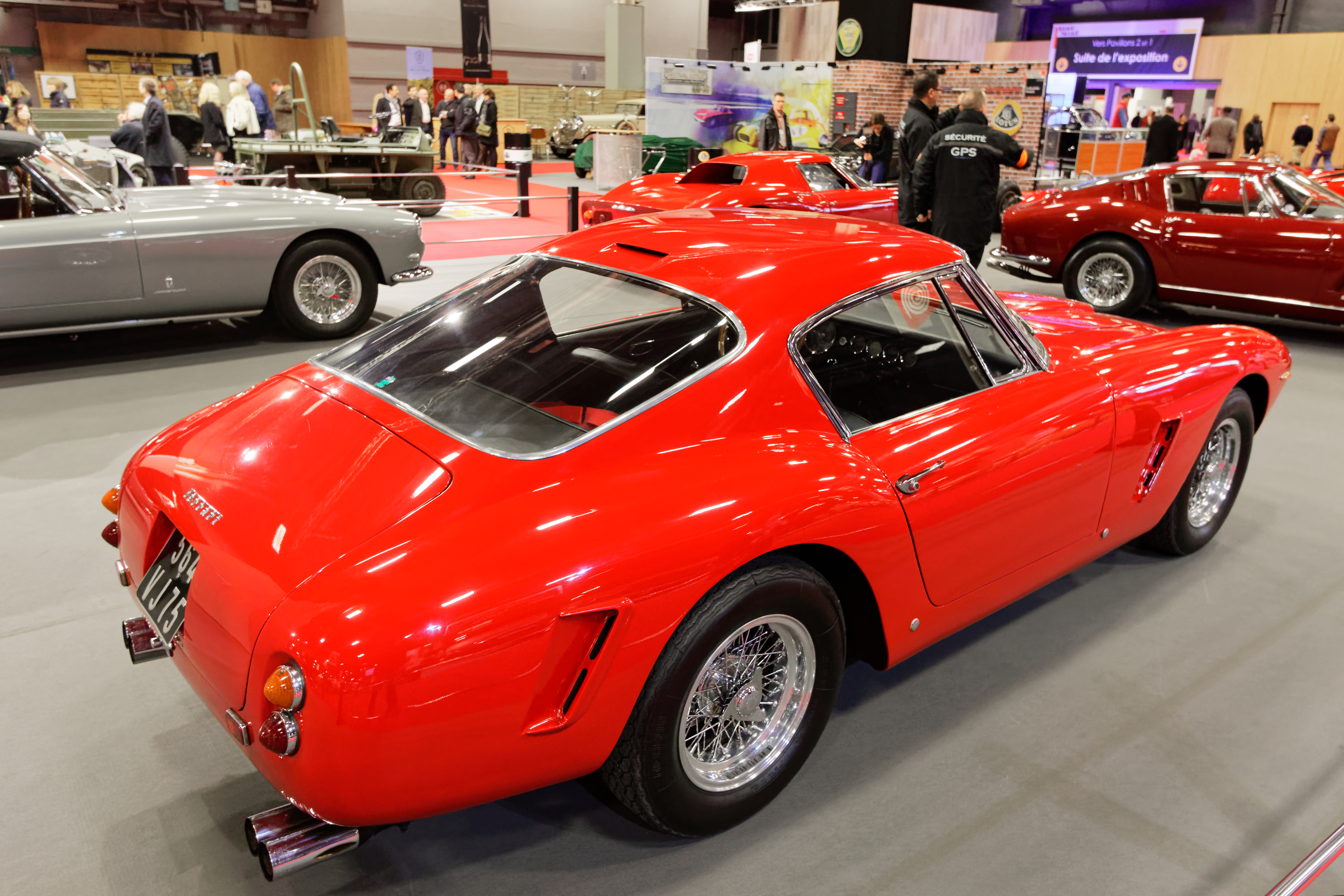 Une 250 GT Berlinetta SWB exposée lors du salon Rétromobile 2017.